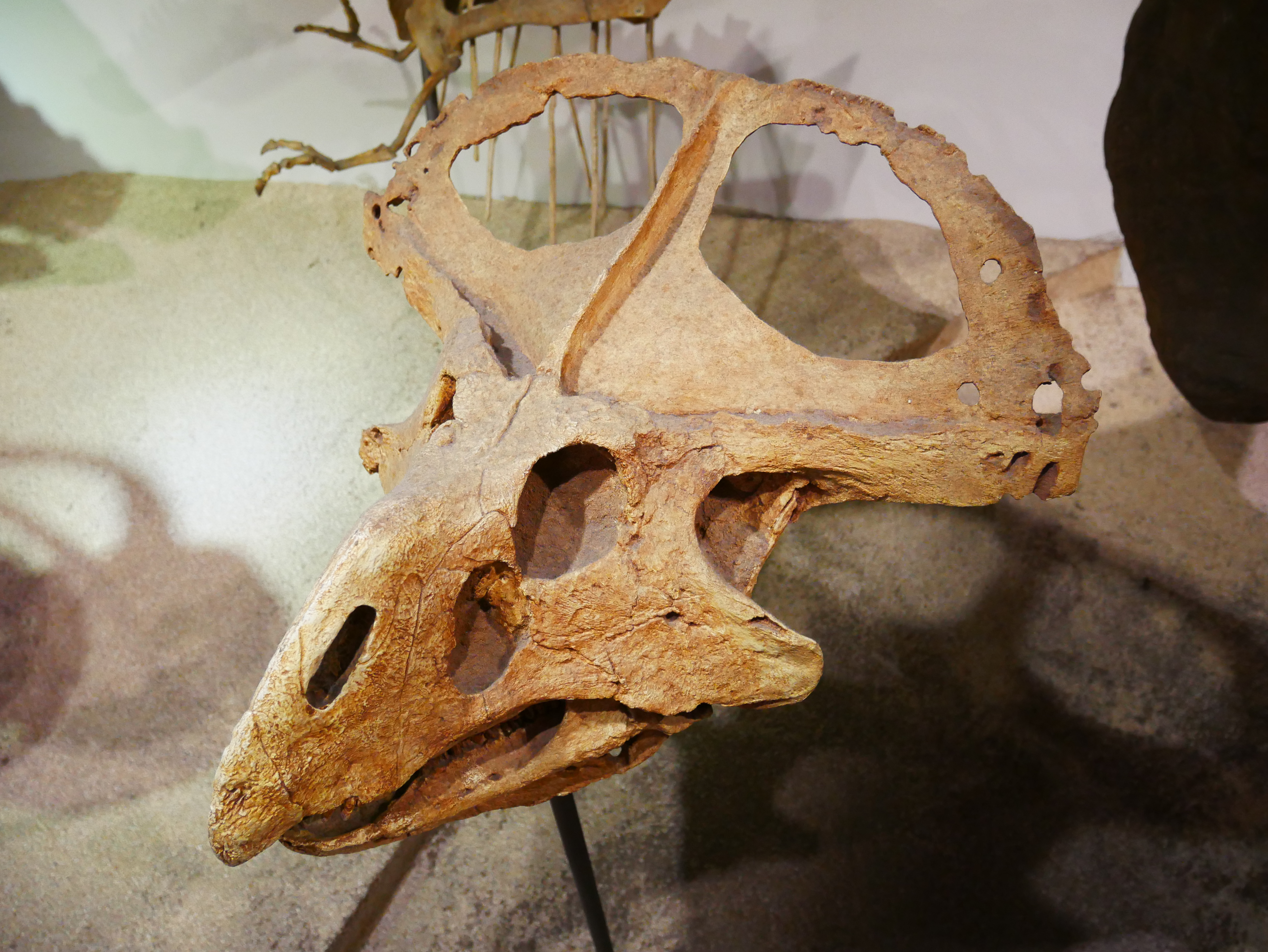 中文（台灣）: 安氏原角龍頭骨（複製品），臺北市中正區城內次分區黎明里